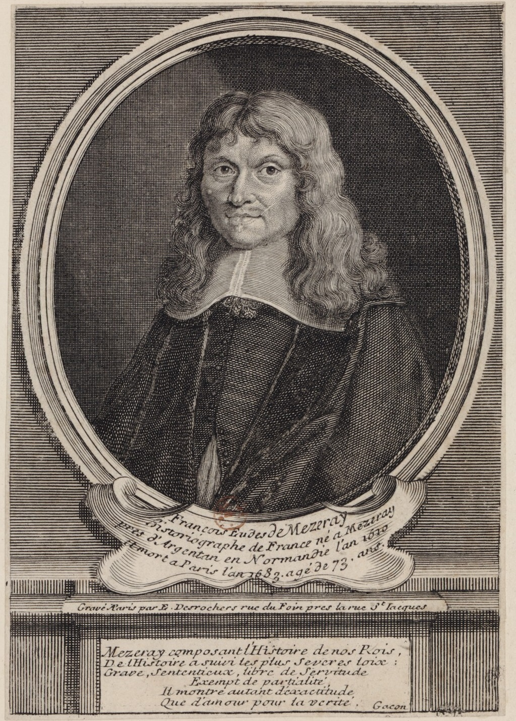 Portrait de François Eudes de Mézeray, en buste, de 3/4 dirigé à gauche dans une bordure ovale, estampe gravée à Paris par Étienne Jahandier Desrochers, rue du Foin près la rue Saint-Jacques.